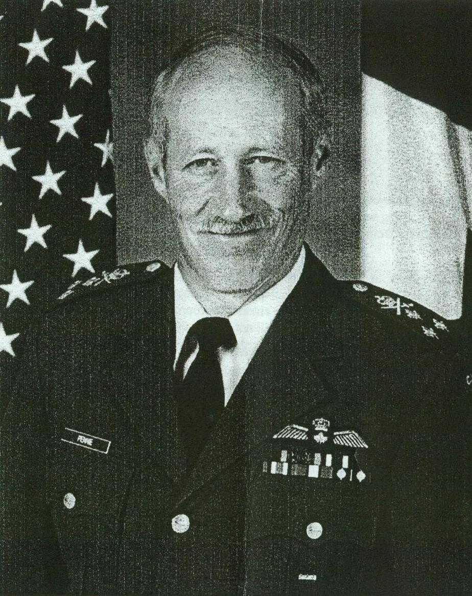 Lieutenant-General K R Pennie